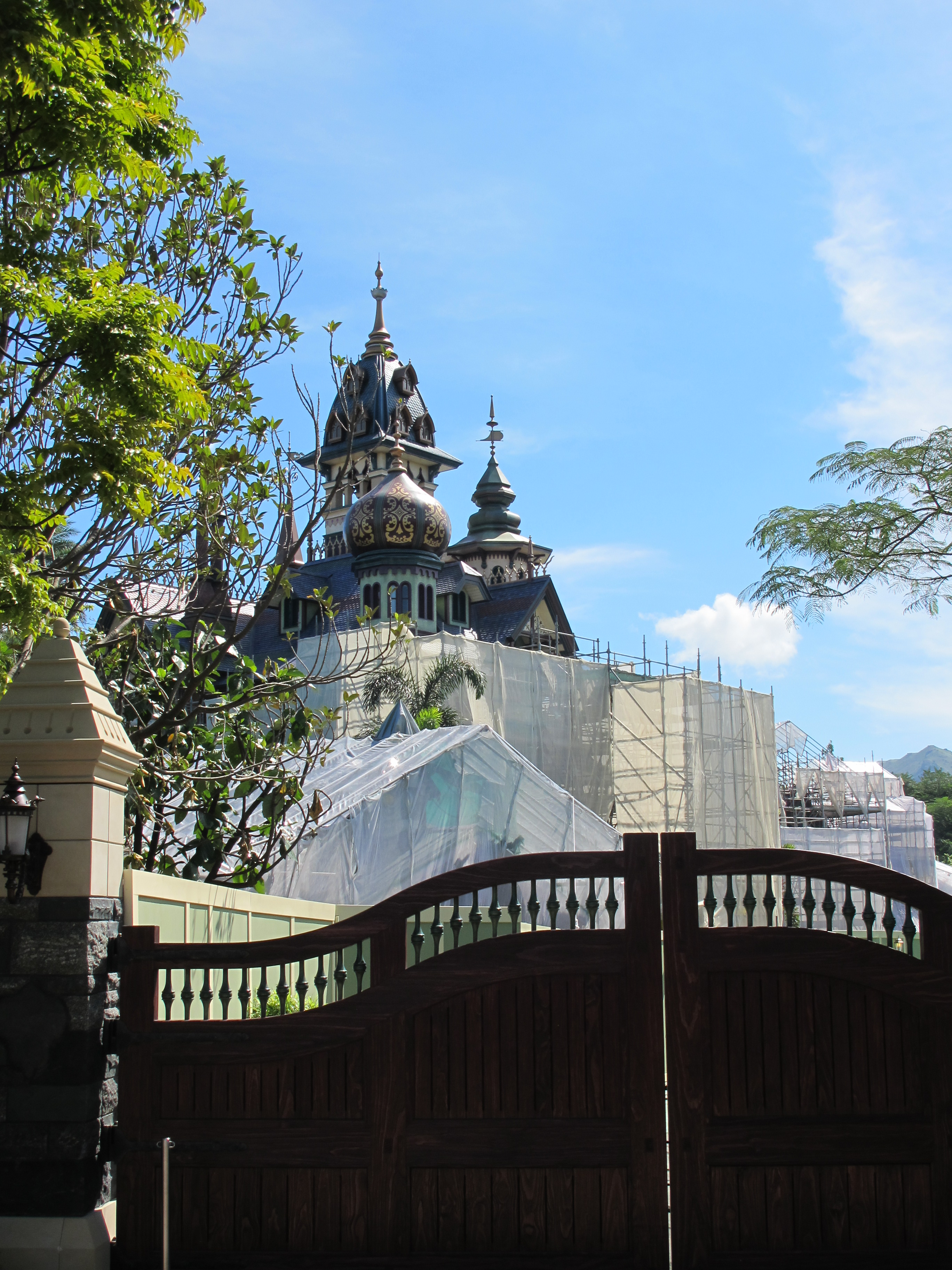 建設中的迷離莊園